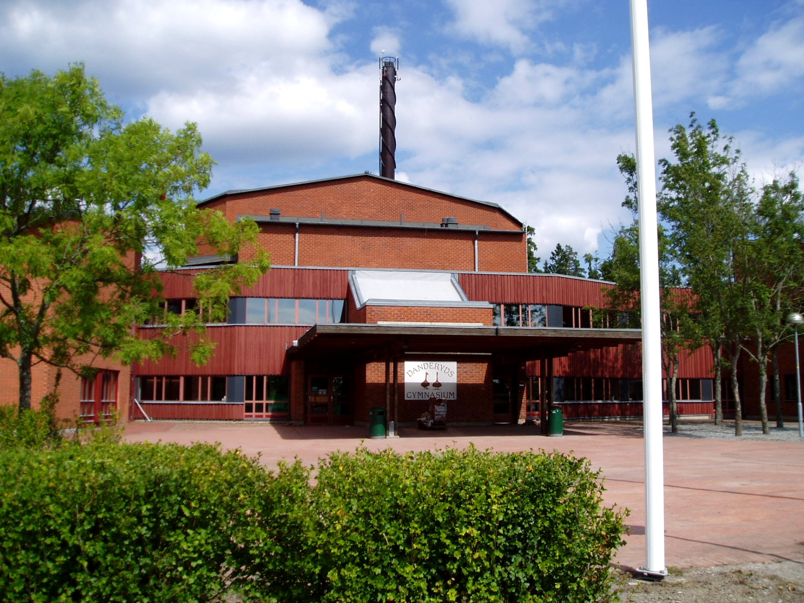 Danderyds gymnasium